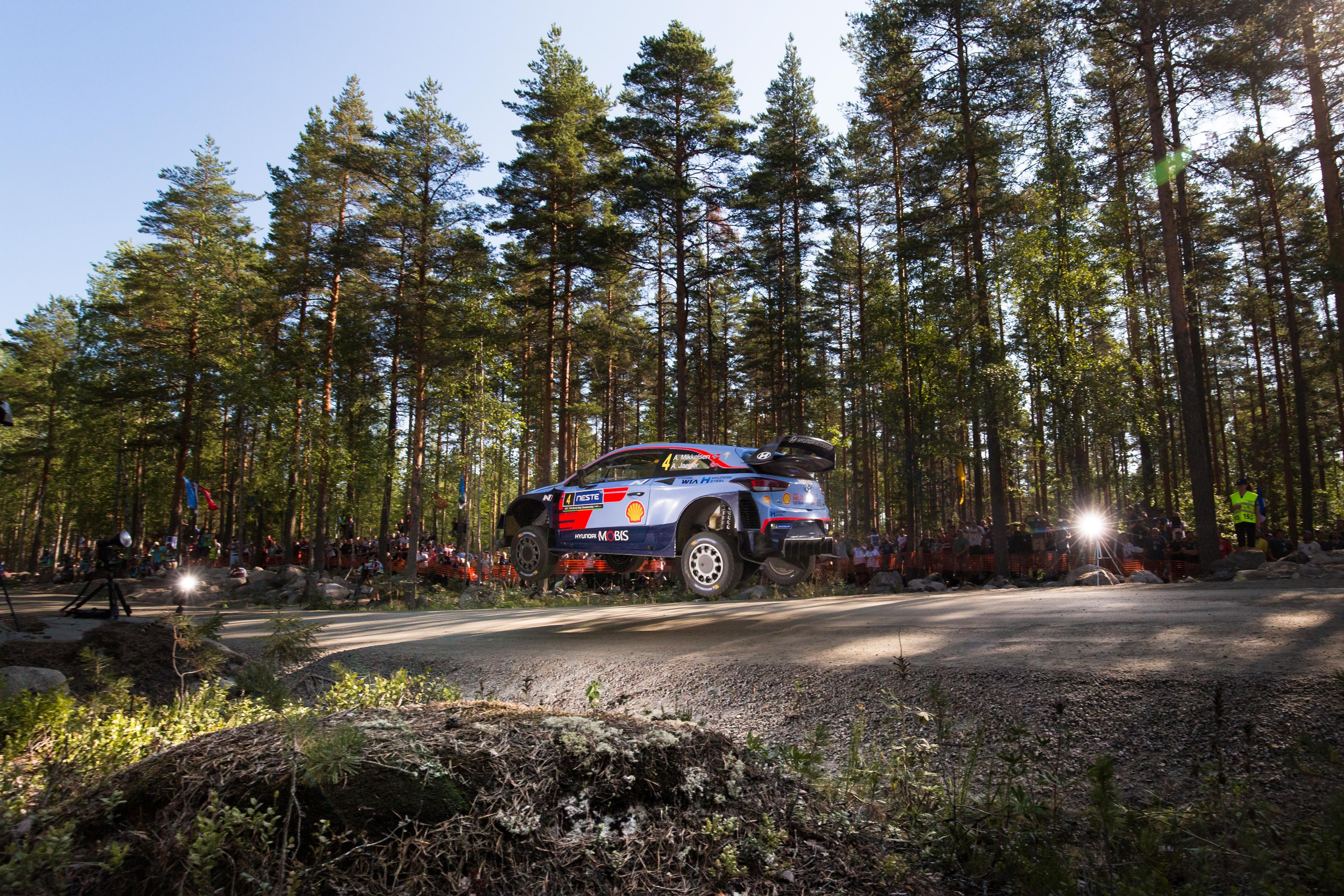 Rajd Finlandii 2018 Andreas Mikkelsen, Hyundai i20 Coupe WRC